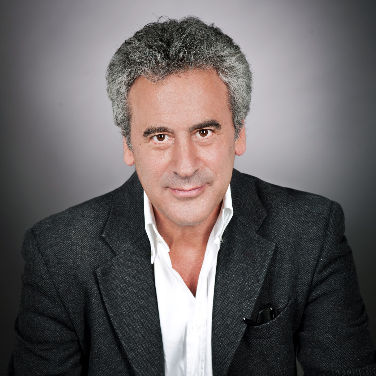 Kepes András magyar író, újságíró, televíziós műsorkészítő, egyetemi tanár a Budapesti Metroplitan Egyetem tanáraként.